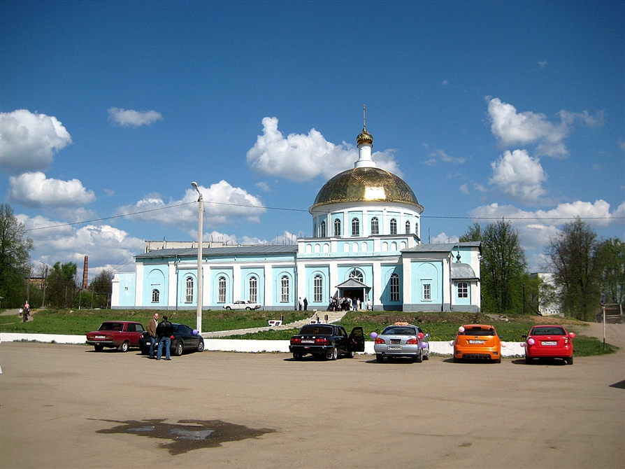 Храм Александра Невского (Калужская область, Киров, посёлок з-да "Стройфаянс")